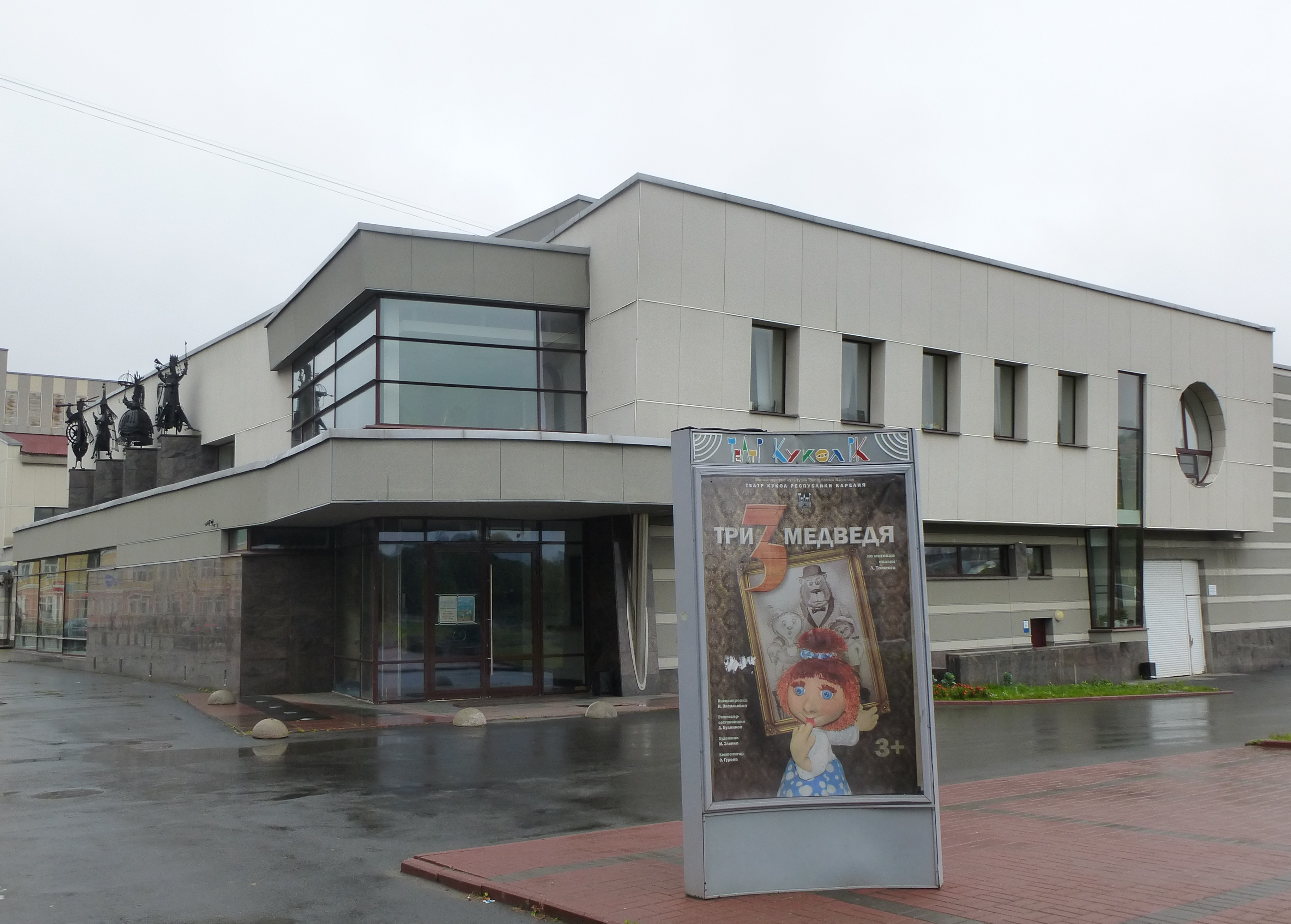 Карельский государственный театр кукол в Петрозаводске на пр.Карла Маркса